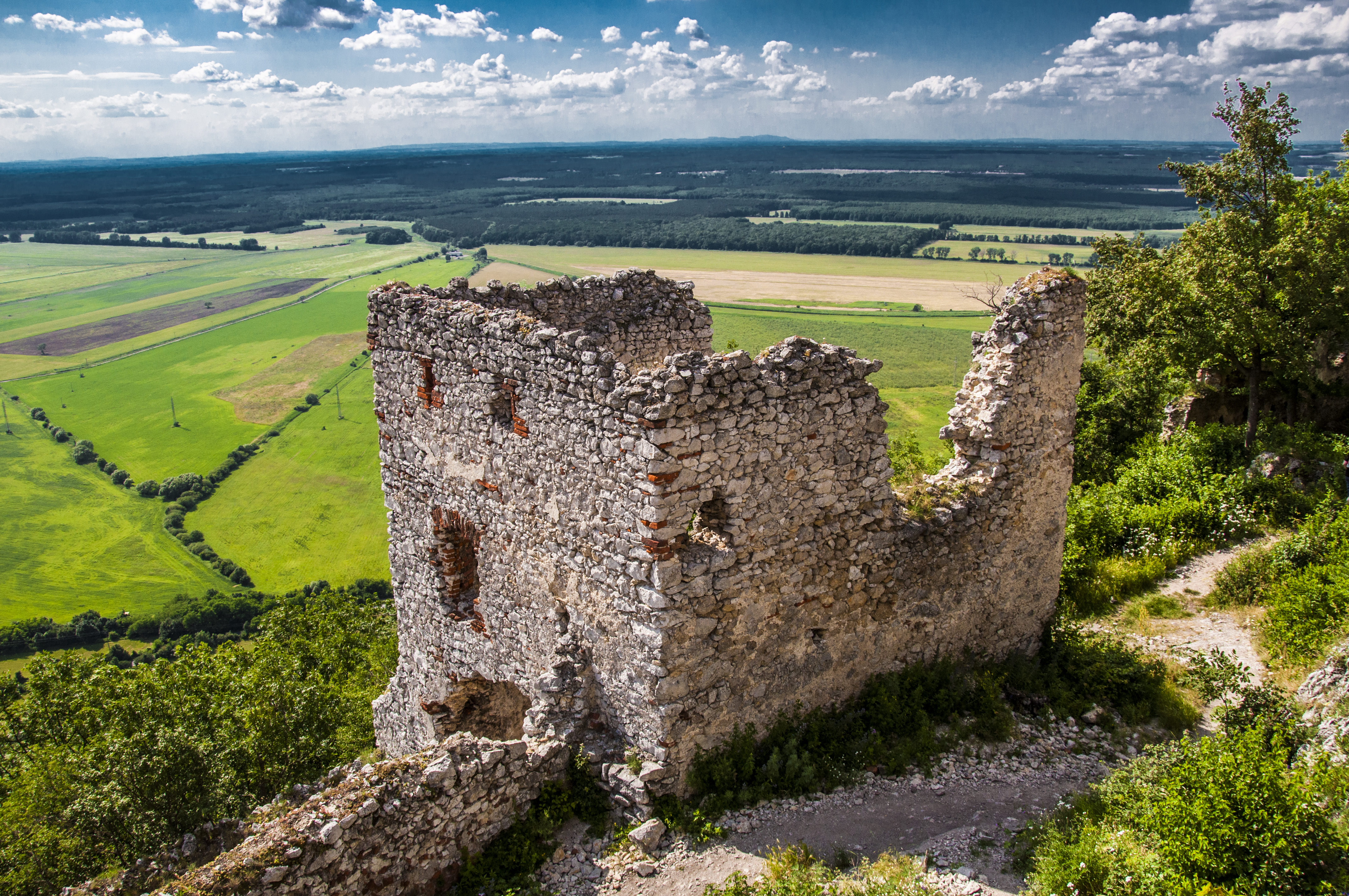 Palác hradný